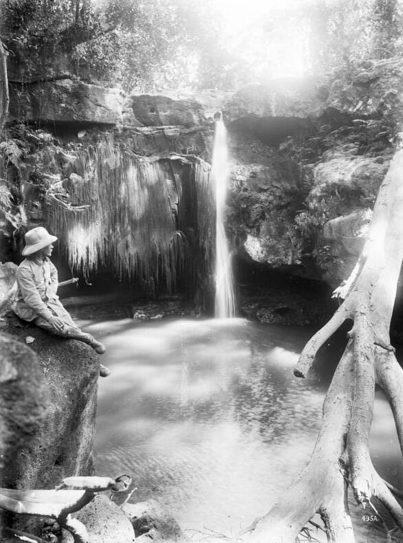 Wasserfall des Issiflusses, Landschaft Kiboscho am Kilimandscharo